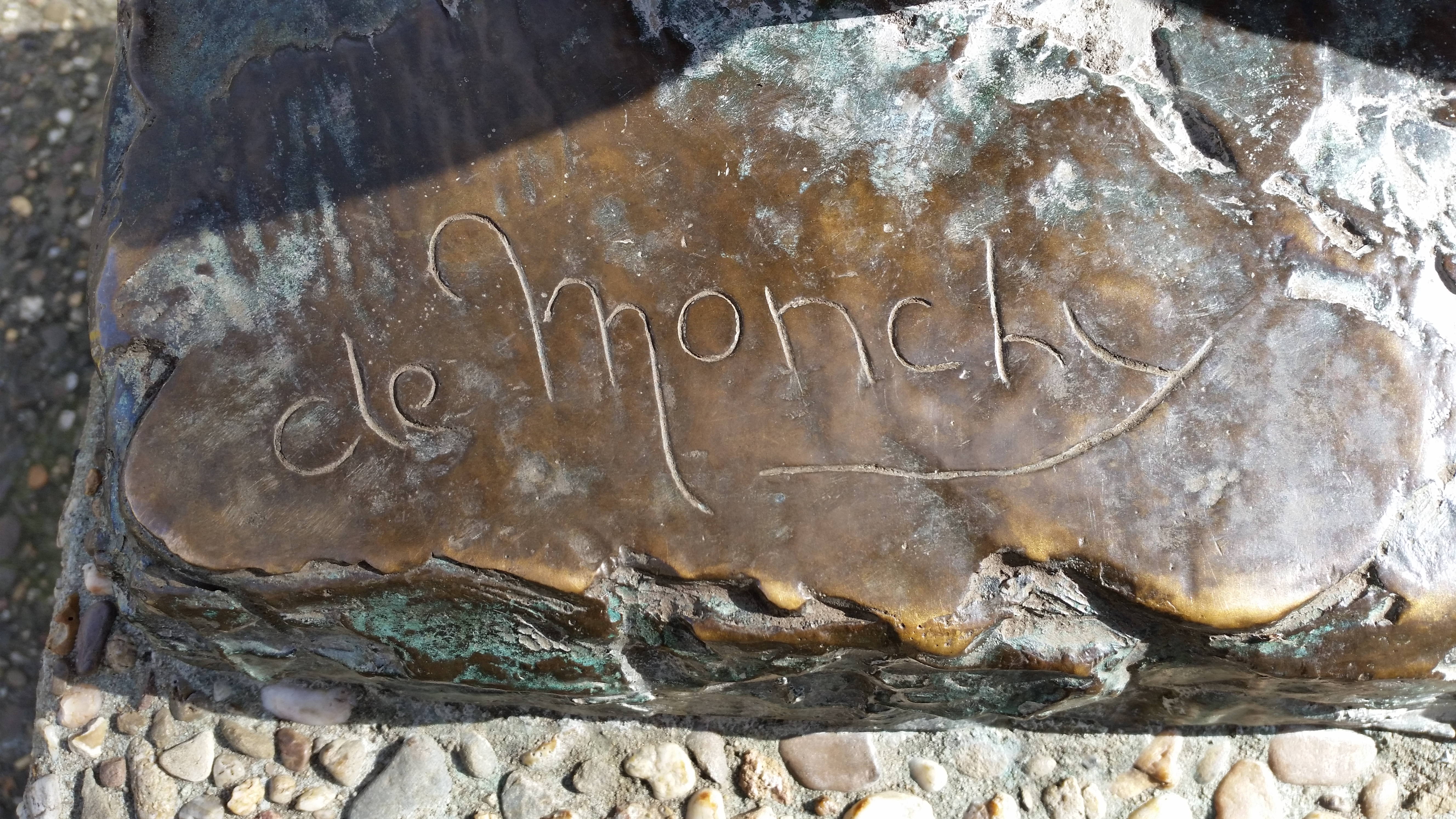 Impressie van De Gewichtheffer van Pieter de Monchy, Kastelenstraat, Amsterdam-Zuid